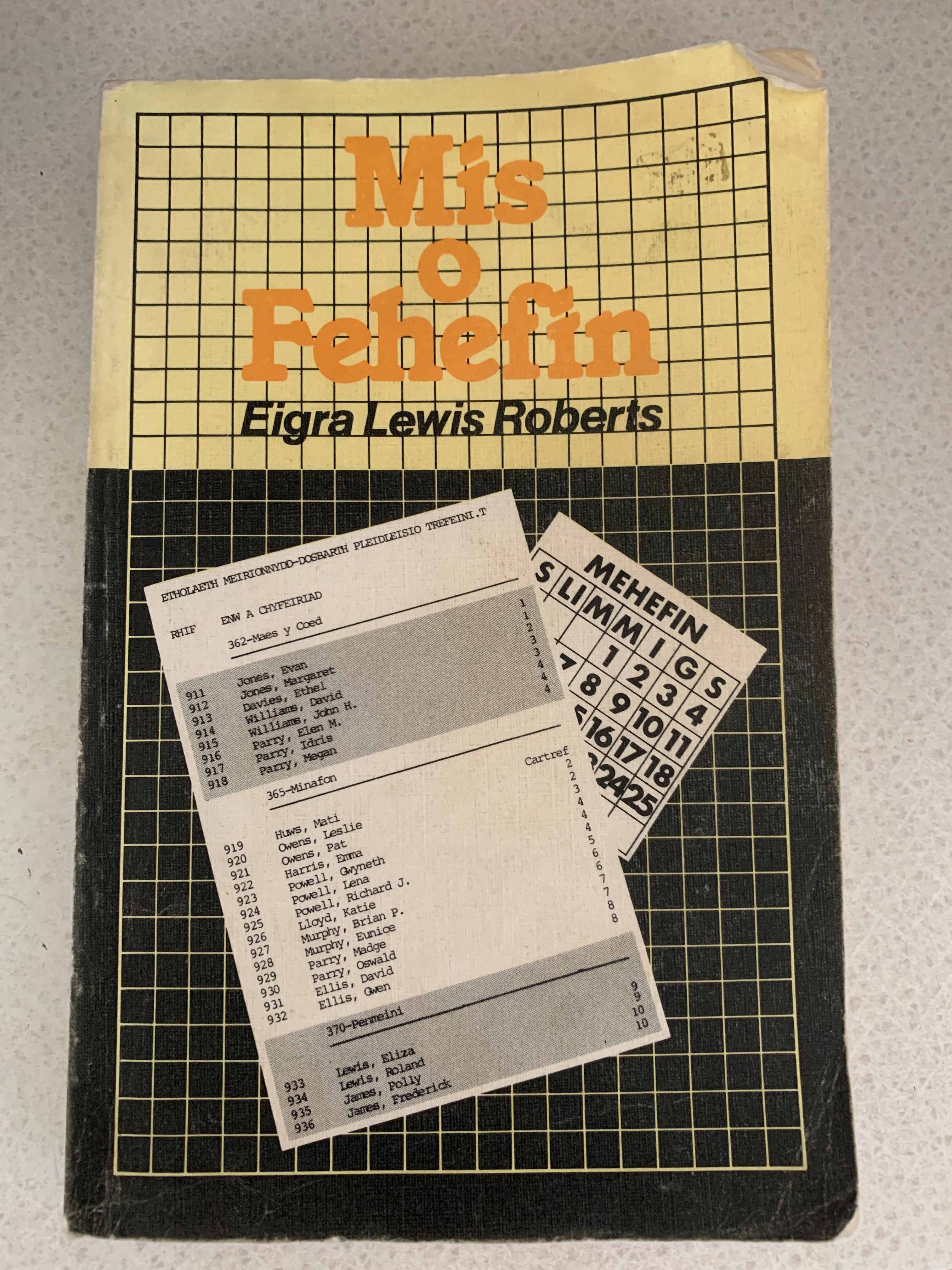 Nofel 'Mis o Fehefin' (1980), gan Eigra Lewis Roberts.